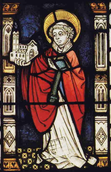 St. Goar, Glasmalerei in der Stiftskirche zu St. Goar, um 1450